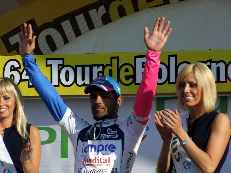 Piąty etap 64. Tour de Pologne: Września - Świdnica. Danilo Napolitano Licensing: This image or multimedia was created by Bartosz Senderek. The image or audio is licensed under CC-BY license. Attribution to me is required. Licencja: Ten obrazek lub plik multimedialny został stworzony przez Barotsza Senderka. Został on udostępniony na licencji CC-BY. Informacja o moim autorstwie jest wymagana. "I want to use the image/multimedia. How can I do that?" You can use this image/multimedia freely for any purpose, including commercial use, provided that you license it under the above license. My suggestion is to use text shown below: If you use the image I would appreciate it if you would let me know on my talk page, but this is not required as long as you follow the above license. "Chcę użyć tego pliku. Jak mogę to zrobić?" Możesz używać tej grafiki/multimediów darmowo w każdym celu, włączając użycie komercyjne, udostępniając go dalej na powyższej licencji. Jeśli zdecydujesz się na publikację zdjęcia mojego autorstwa obowiązkowo podpisz go w sposób podany w sekcji "Licensing text". Jeżeli użyłeś mojego pliku możesz powiadomić mnie o tym na mojej stronie dyskusji, lecz nie jest to wymagane, dopóki trzymasz się powyższej licencji.